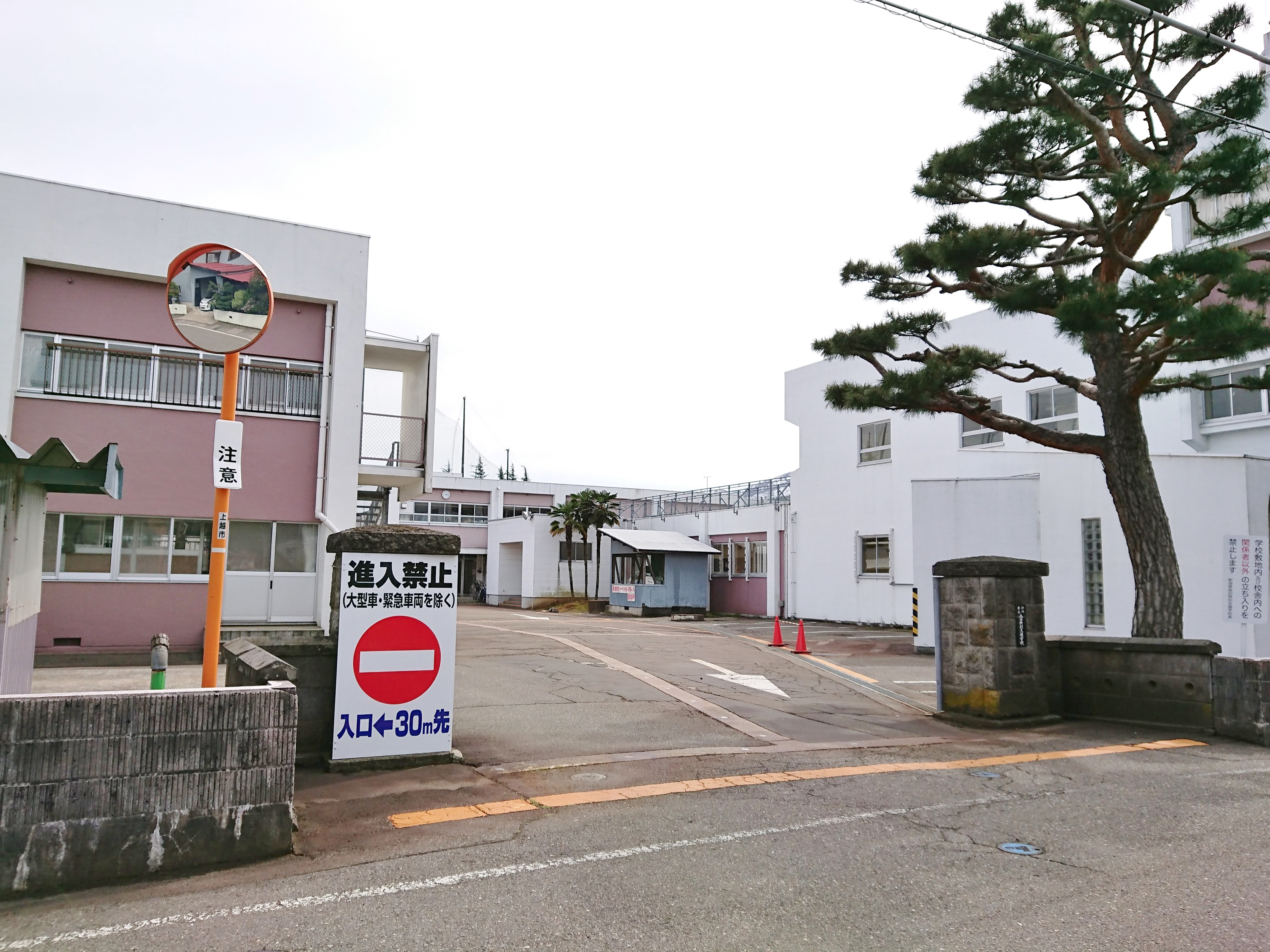 新潟県立高田特別支援学校の校門